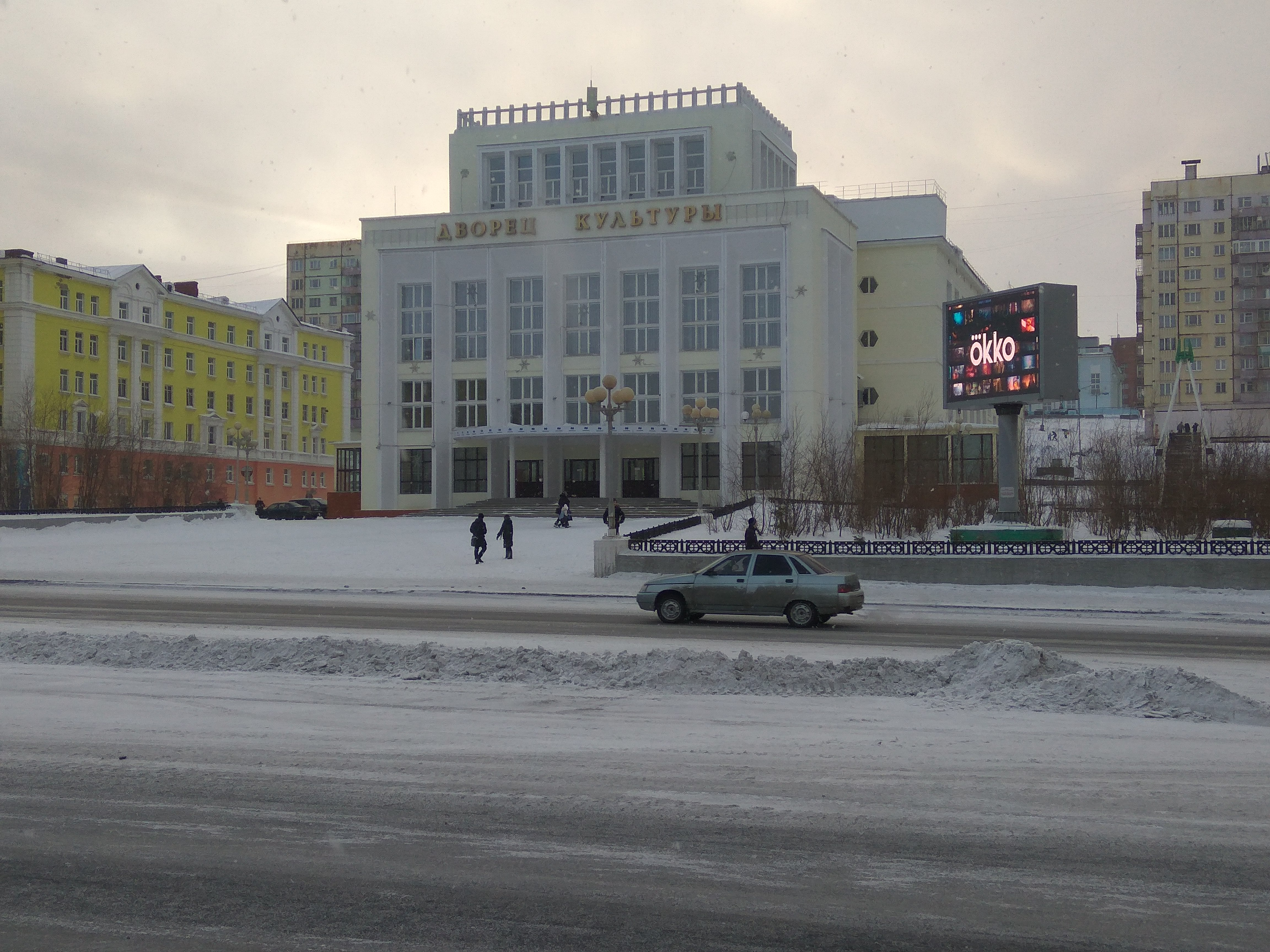 Дворец культуры комбината: проспект Ленинский, 9, Норильск, Красноярский край